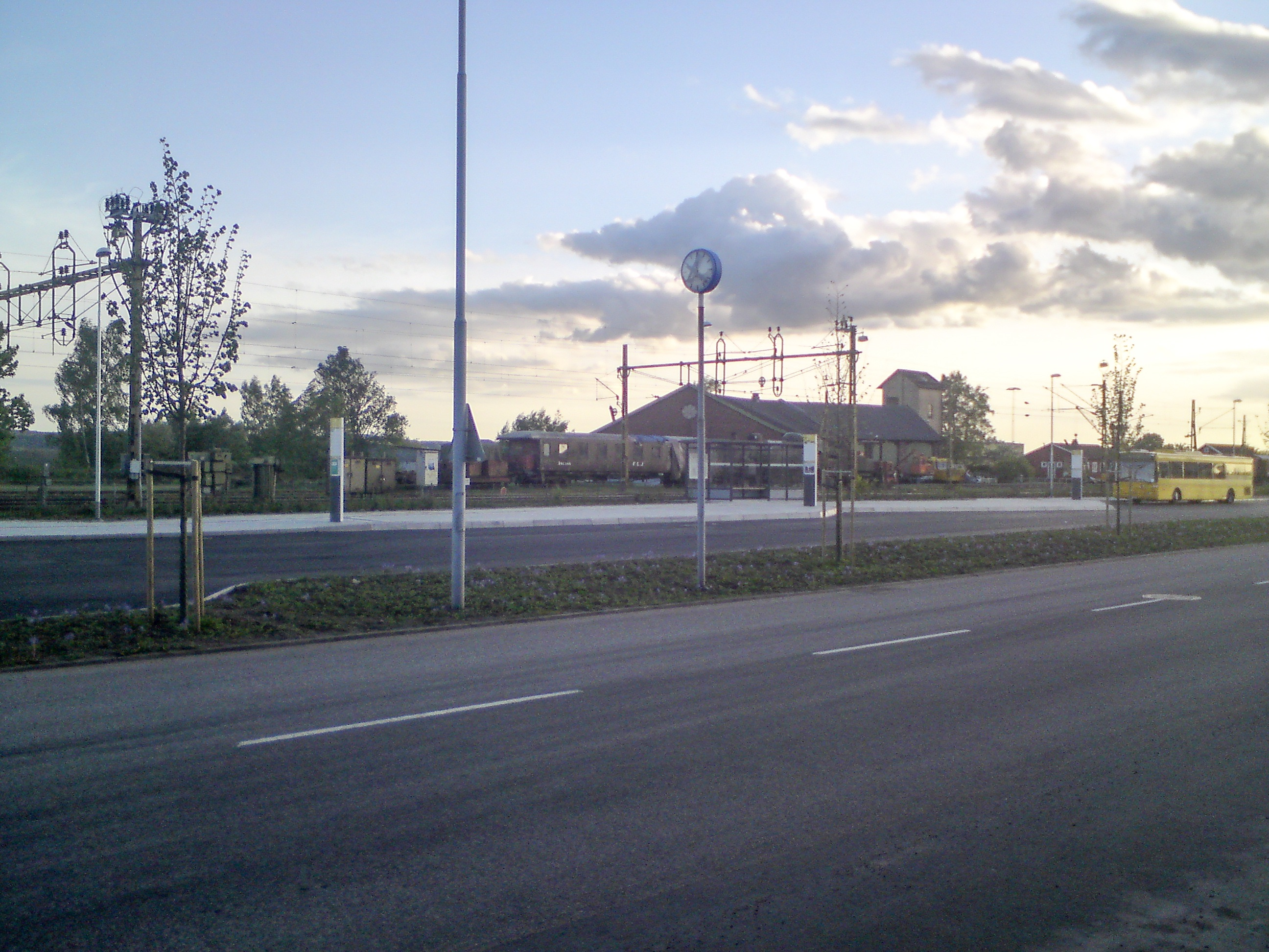 Klippans station